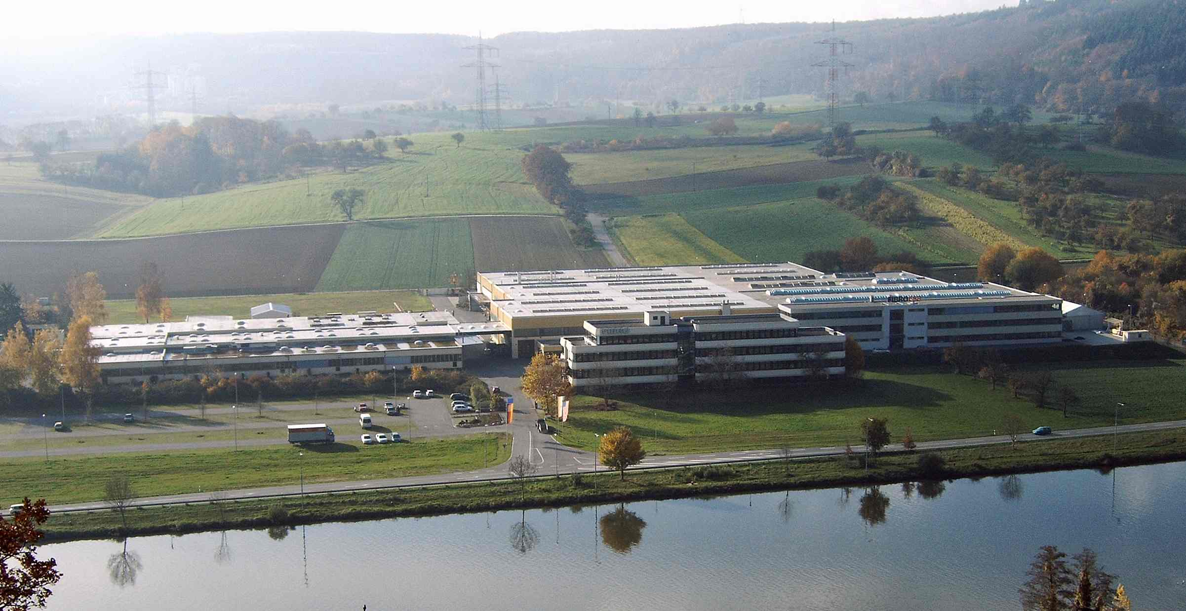 Fibro-Werk Haßmersheim